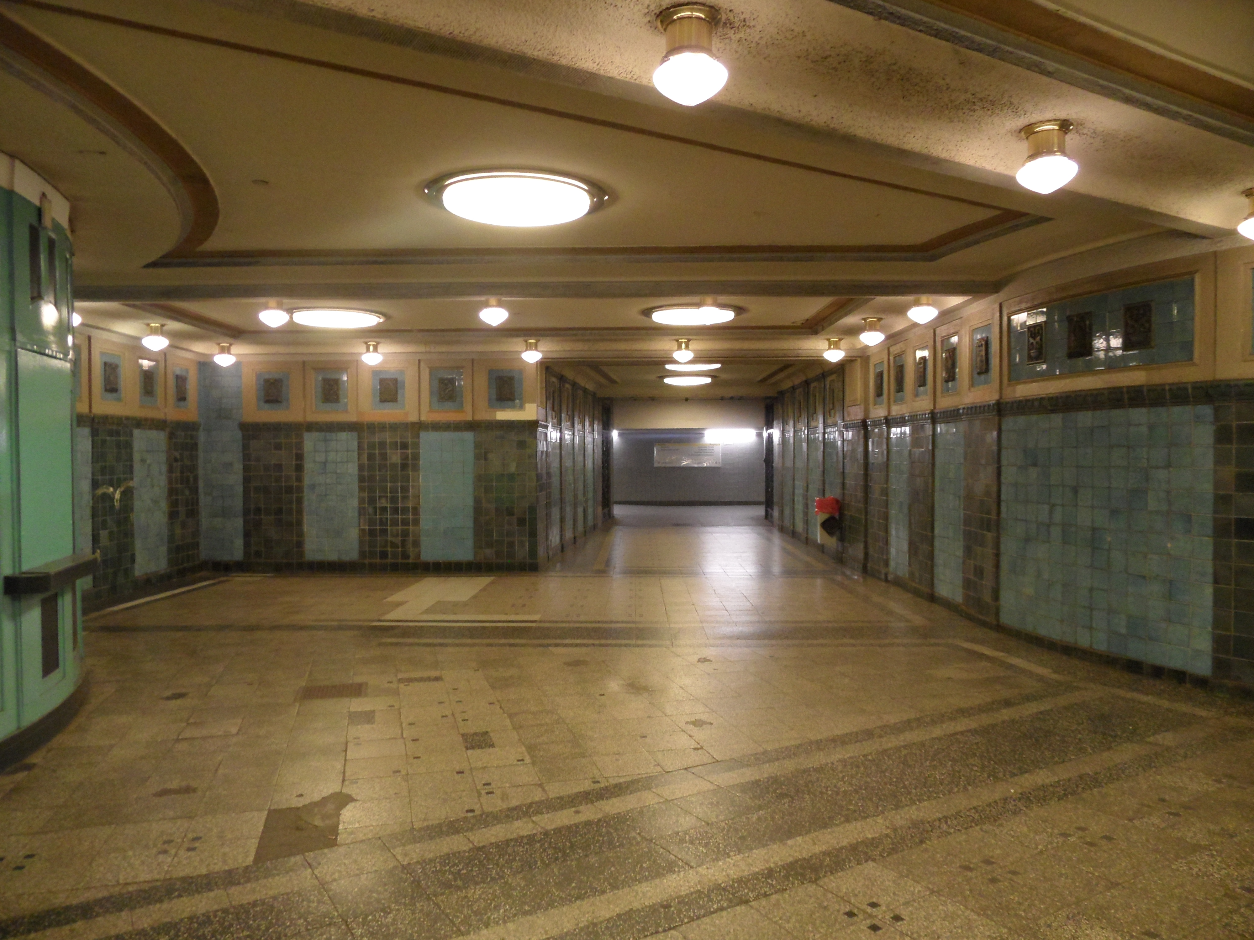 Berlin - U-Bahnhof Heidelberger Platz - Linie U3